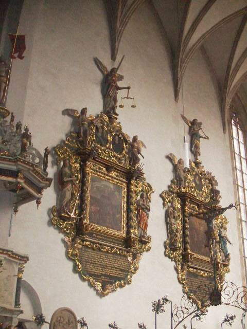 Epitaphe im Chorraum der evangelischen Kirche Kircheim unter Teck. Links das Epitaph für Konrad Widerholz († 1667) und seine Frau Hermengard geb. Burckhardt (†1666).